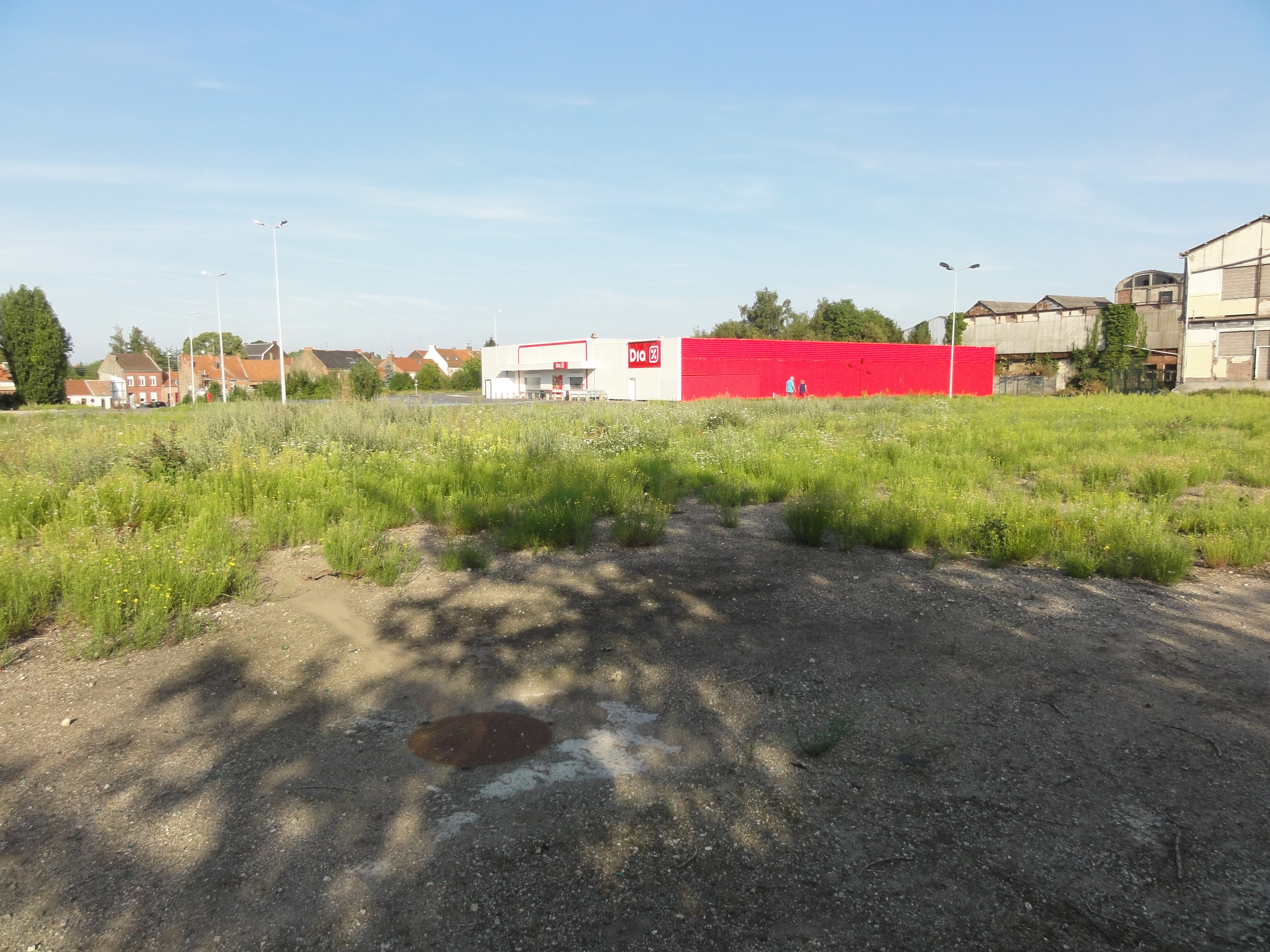 La Fosse Sainte Catherine - Saint Mathias de la Compagnie des mines d'Aniche était un charbonnage constitué de deux puits situé à Aniche, Nord, Nord-Pas-de-Calais, France.